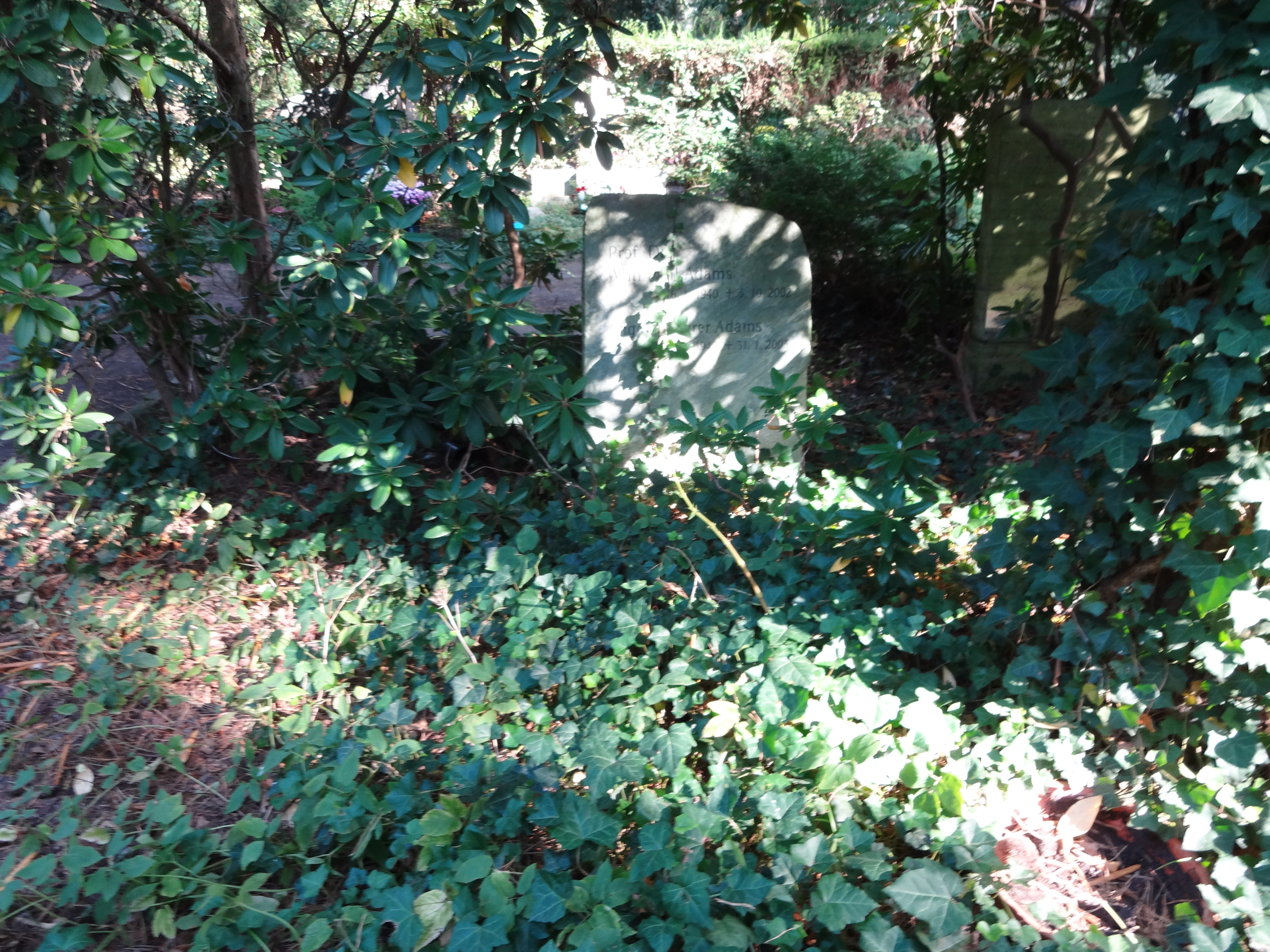 Grab von Prof. Wille Paul Adams auf dem Waldfriedhof Dahlem in Berlin